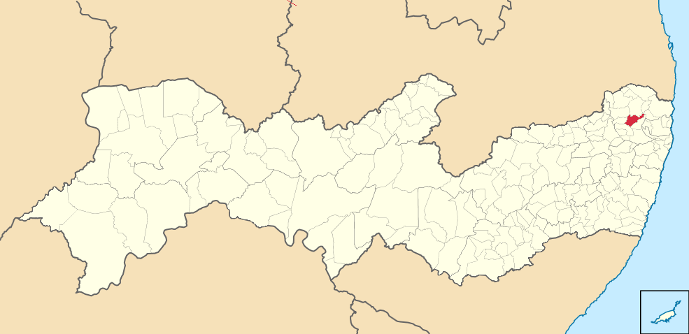 Mapa de Nazaré da Mata (2)